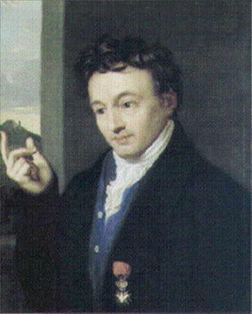 Johann Wolfgang Döbereiner Brustbild, 3/4 Profil nach links, neben einem Fenster des Hauses Neugasse 23 mit Blick auf Jenaer Hausberg mit Fuchsturm bei aufgehender Sonne. Im Vordergrund das Jenaer Paradies. Kopf wenig geneigt, die rechte Hand erhoben, Kurzes gelocktes Haar, grüne Augen, schwarzer Frack mit Orden an rotem Band; hellblaue Weste, Halstuch. Abmessungen: Höhe: 66 cm; Breite: 57 cm; Material: Leinwand (Keilrahmen); Technik: Öl; Standort: Friedrich-Schiller-Universität Jena/Kustodie